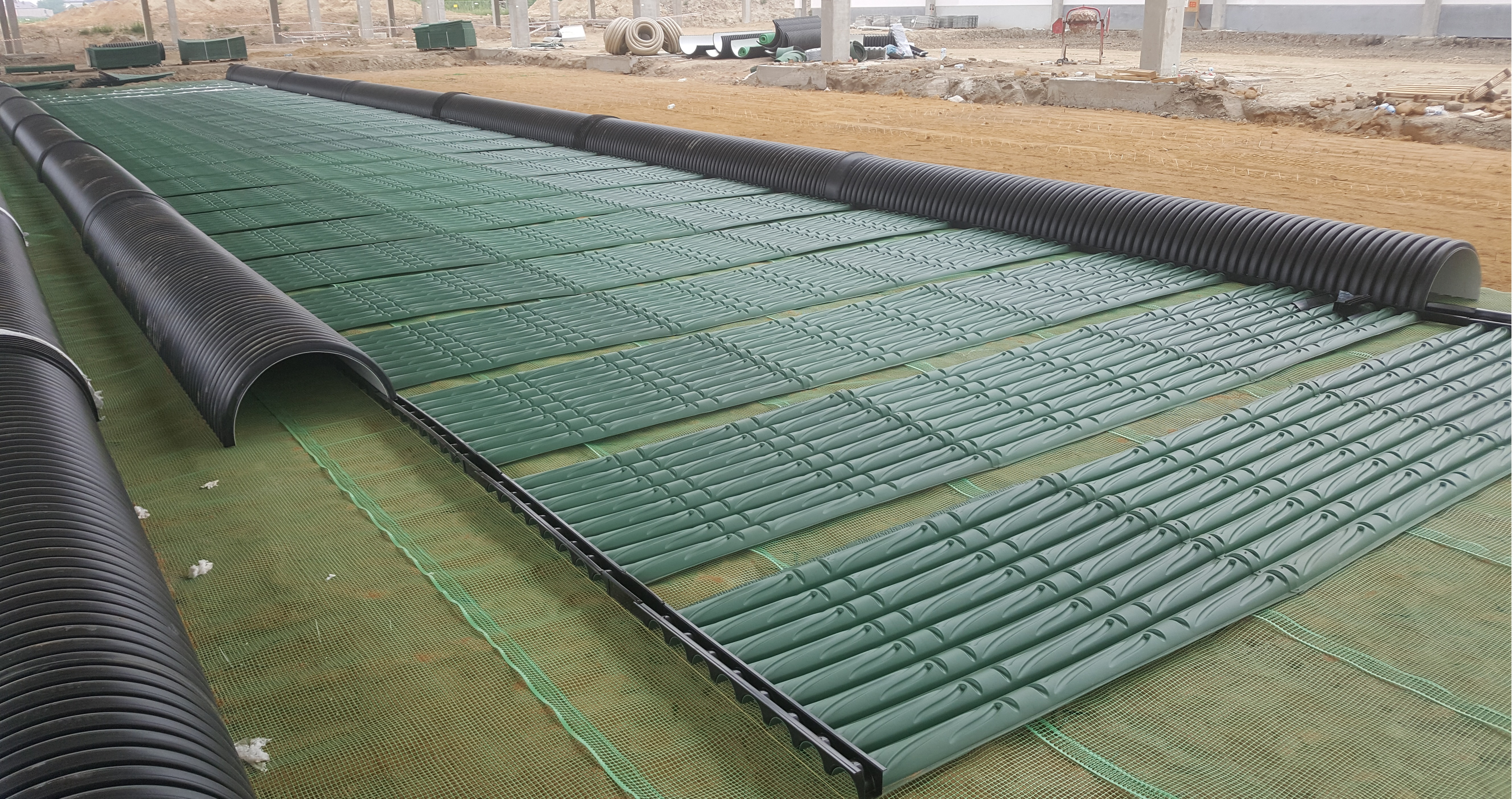 GMC GEOSTRONG w trakcie montażu. Na zdjęciu są widoczne elementy składowe wymiennika tj. moduły transportujące powietrze, grzebienie kolektory i siatka stabilizującą